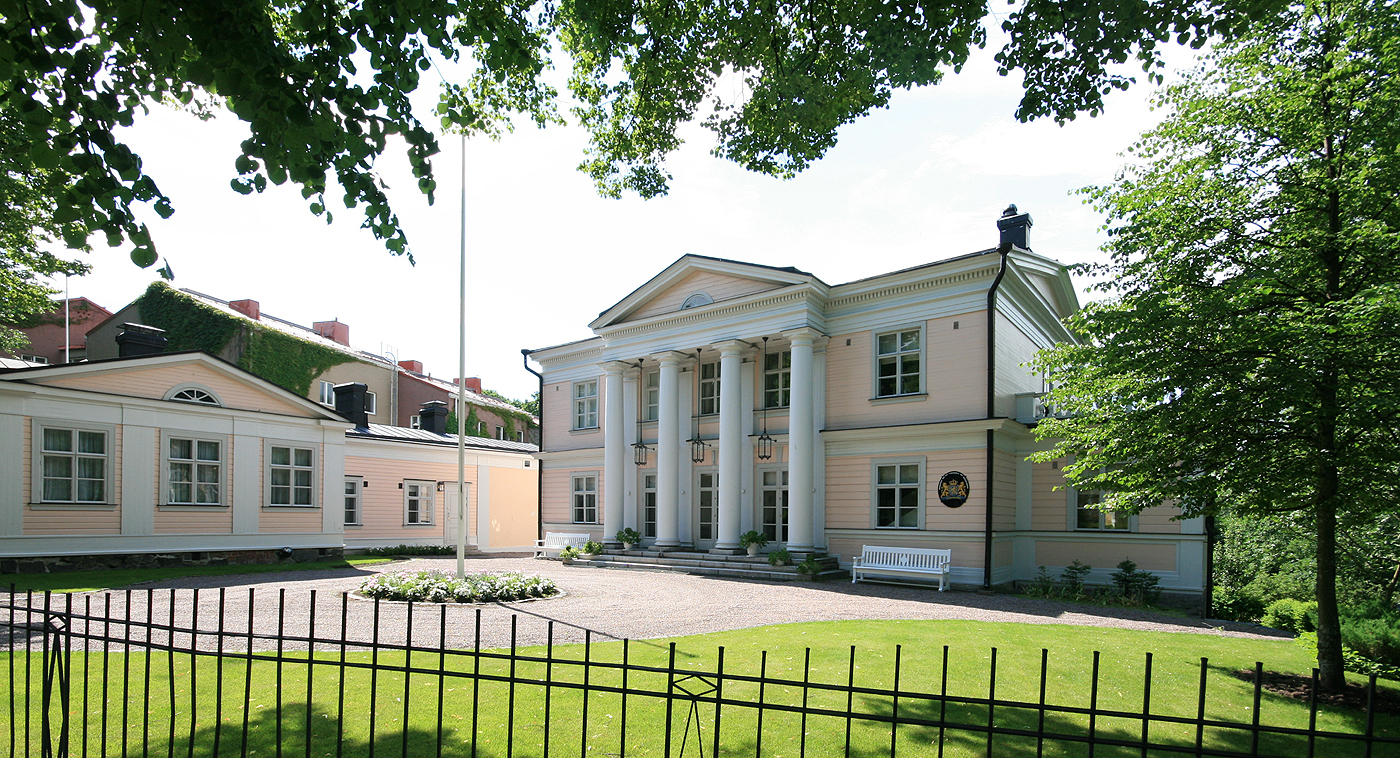 Kleineh Villa, Itäinen Puistotie 7, Helsinki. Gebouwd in 1839 tegenover Kaivohuone for gasten van het badhuis van Ullanlinna. Het gebouw had oorspronkelijk een centrale sectie met twee verdiepingen; de vleugels waren één verdieping hoog en hadden platten daken. De villa en het residentiële en commerciële gebouw aan de zuidkant van de kavel zijn uitgebreid en opgehoogd (architecten Jean Wik en Theodor Decker). De huidige uitstraling van de villa dateert van een renovatie in 1929 door architect Birger Federley. Tegenwoordig is dit de residentie van de Nederlandse ambassade.